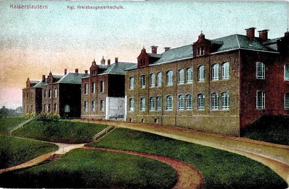 Ehem. Baugewerkschule Kaiserslautern zw. 1897 und 1944